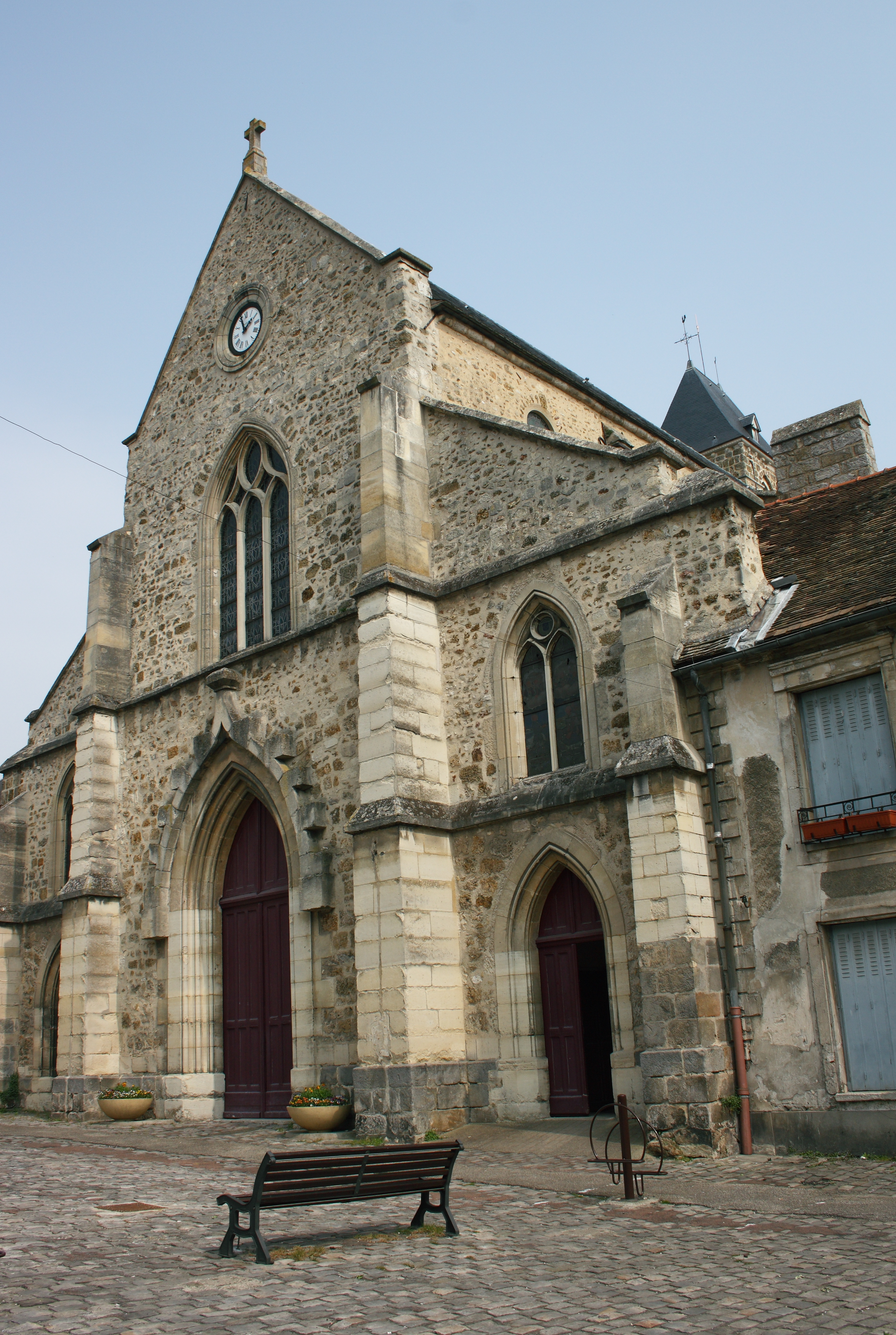 Katholische Pfarrkirche Saint-Clément in Arpajon im Département Essonne (Île-de-France), Westfassade